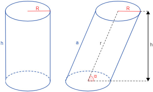 Cilindre recte (esquerra) i cilindre oblic (dreta) amb base circular, de radi R i d'altura h. El cilindre oblic té un angle α d'inclinació respecte de la base.